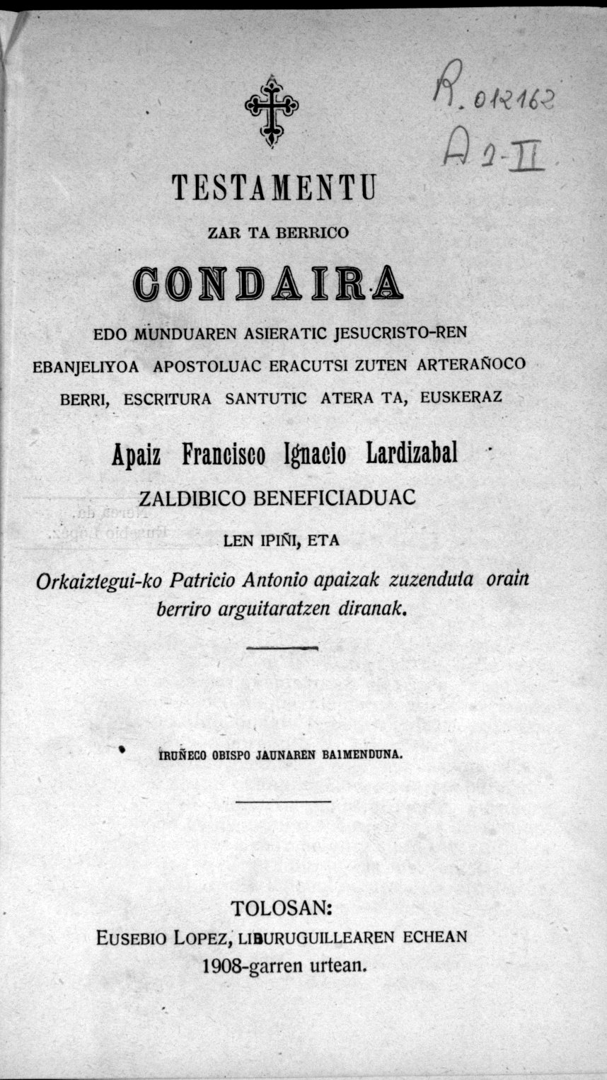 Frantzisko Inazio Lardizabal idazlearen Testamendu Zer eta Berrico Condaira lanaren azala (1855. 1908ko argitaralpena)